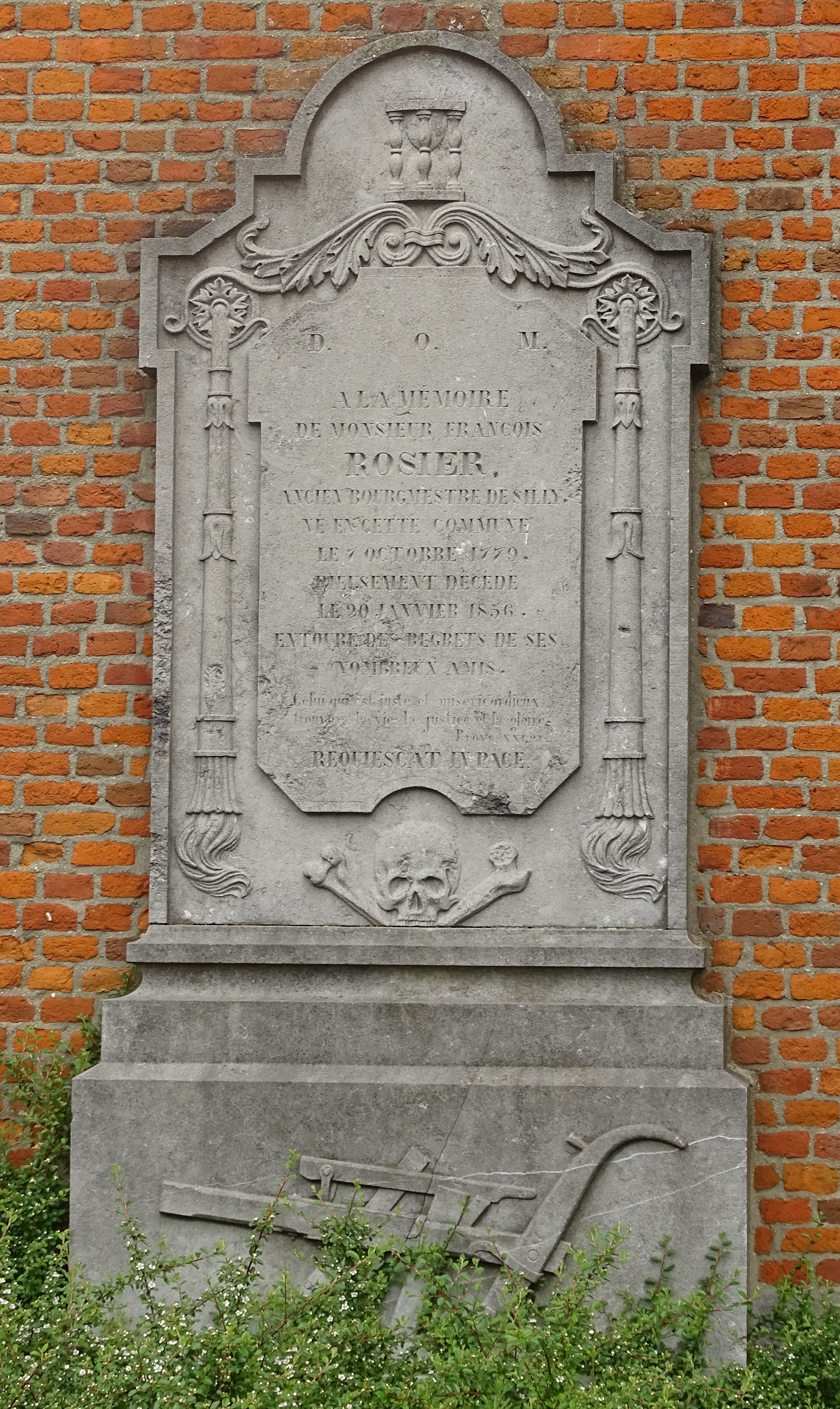 Reportage réalisé le dimanche 15 mai à l'occasion du départ du Grand Prix Criquielion 2016 à Silly, Belgique.